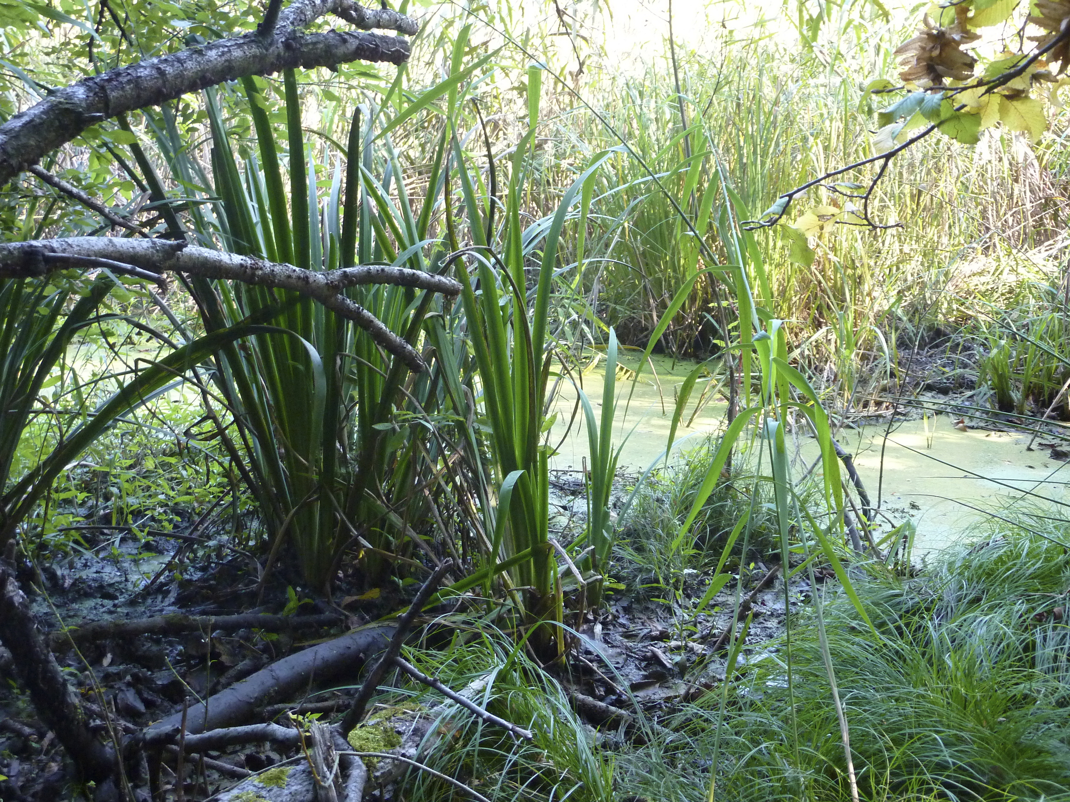 Frankfurt am Main, Stadtwald: Der Rohsee, auch Rohrsee oder Rodsee genannt, ein sumpfiges Stillgewässer auf dem Gebiet des Stadtteils Schwanheim, entstand aus einem linken bzw. südlichen Altarm des Mains. Das Gewässer fällt abhängig vom Grundwasserspiegel zeitweilig nahezu trocken. Der Rohsee zählt zu den artenreichsten Stillgewässern in Frankfurt. Das Foto zeigt ein Beispiel für die Vegetation am westlichen Ufer.